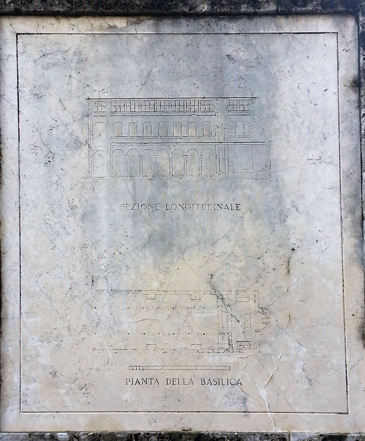 Epigrafe con la pianta della chiesa di Sant'Alessandro alla Colonna.